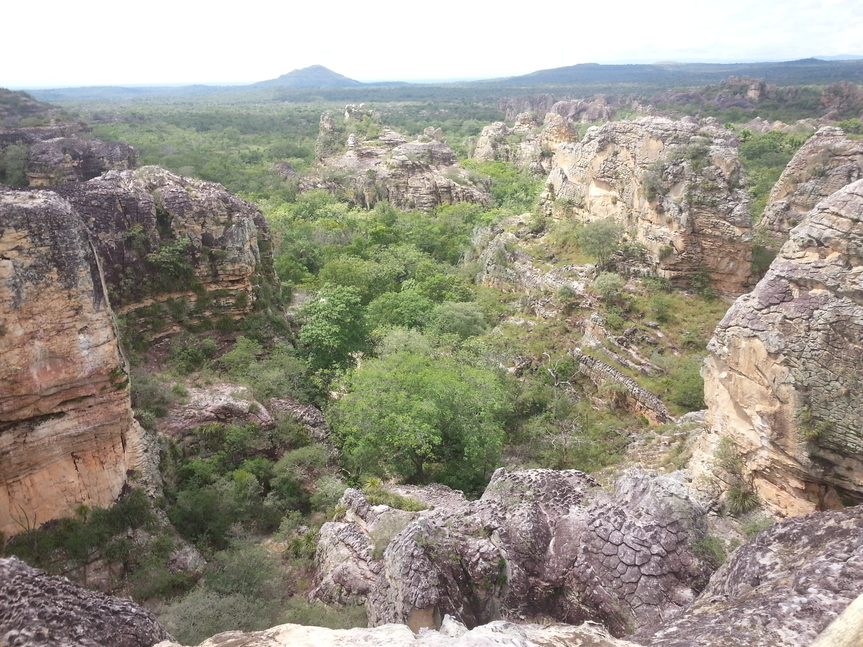 O Parque Nacional das Sete Cidades, em Piripiri-Piauí-Brasil, foi criado em 1961. Abriga inúmeras pinturas rupestres em diversas formações rochosas.